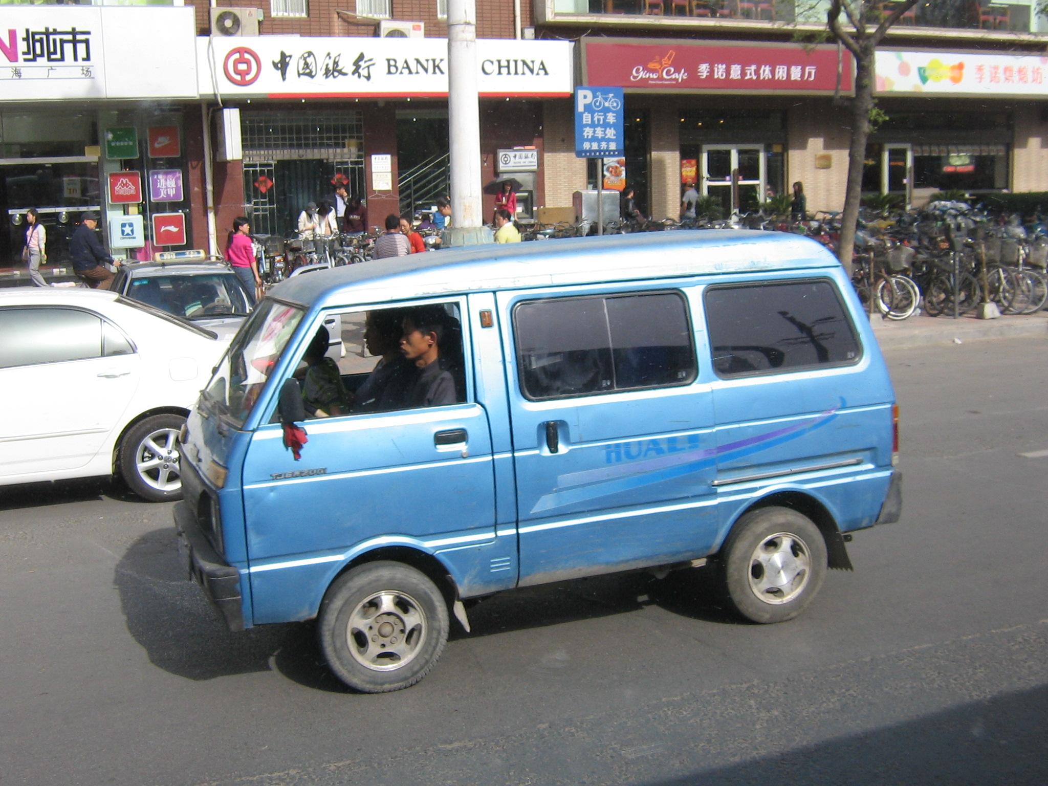 Tianjin Huali TJ6320 Dafa